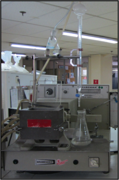 Un farinographe